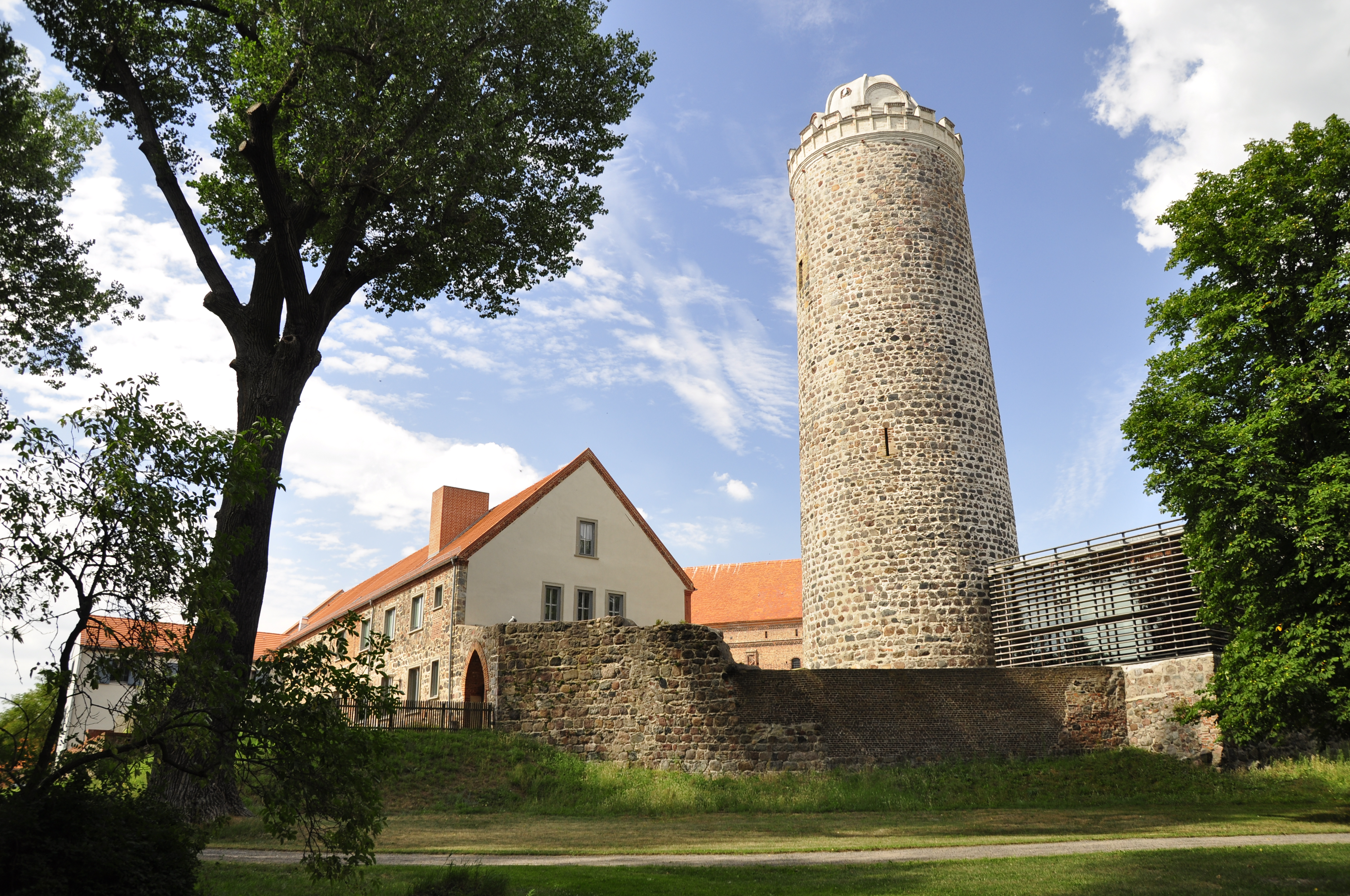 Burg Ziesar